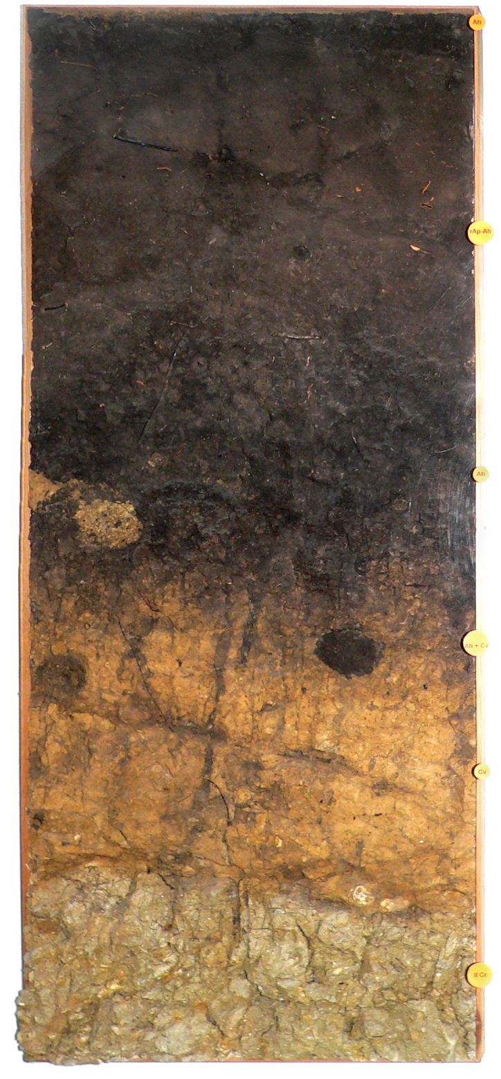 Schwarzerdeprofil im Heimatmuseum Harsum vom Aseler/Borsumer Wald, einer der wenigen heutigen deutschen Wälder auf Schwarzerde Ah = stark humoser Horizont, stark durchwurzelt rAp-Ah = stark humoser ehemaliger Pflughorizont mit Baumwurzeln Ah = humoser Horizont, entstanden durch Humusanreicherung durch das Wühlen durch Bodentiere Ah+Cv = Übergangshorizont Cv = Ausgangsmaterial als kalkhaltiger Löss, angeweht während der Eiszeit IICr = periglazial überprägter Kreideton